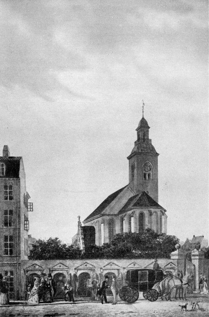 Helligåndskirken, Copenhagen, Denmark. Lærredsboderne. (Shops.)